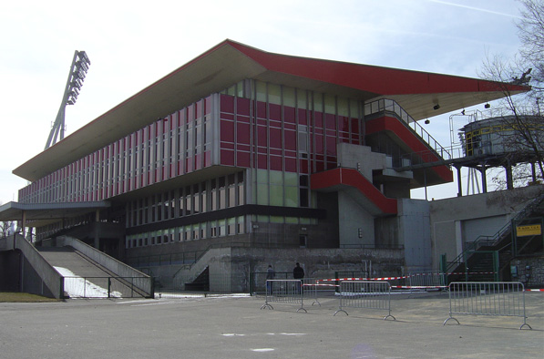 The Friedrich-Ludwig-Jahn-Sportpark, Prenzlauer Berg, Berlin, Germany